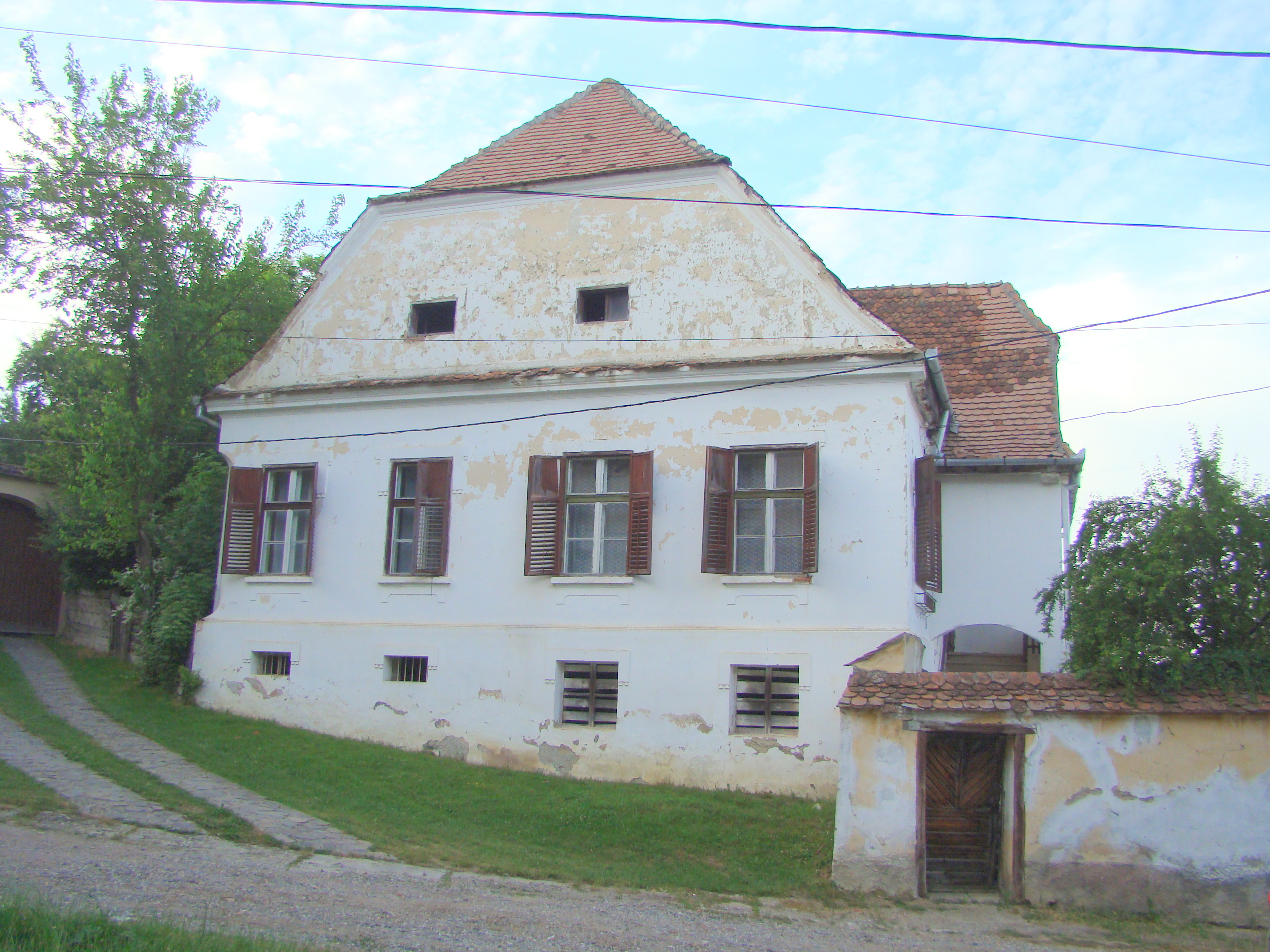 Ansamblul rural „Str. Principală”, sat Ticușu Vechi; comuna Ticuș Str. Principală, ambele laturi ale străzii, sec. XVIII - XX